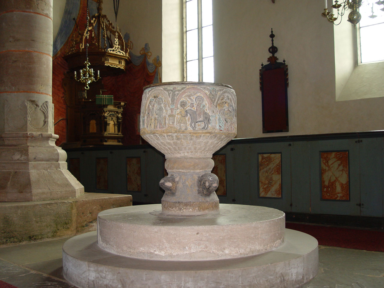 Hamra kyrka (Gotland). Taufbecken aus Sandstein, hergestellt von Meister Semi-Bysantios im 12.Jh.